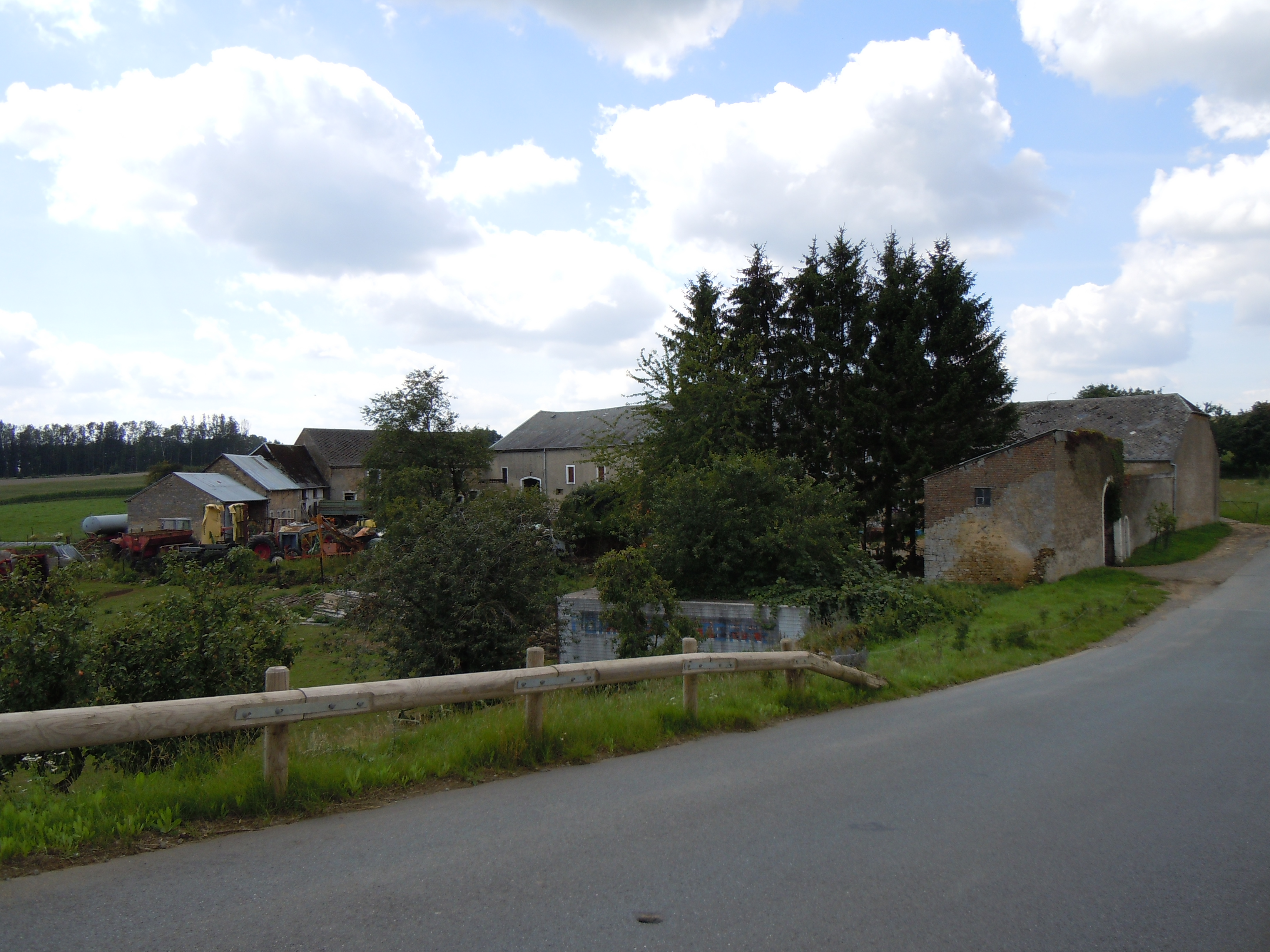 La ferme du lieu-dit Birel (ville belge d'Arlon)